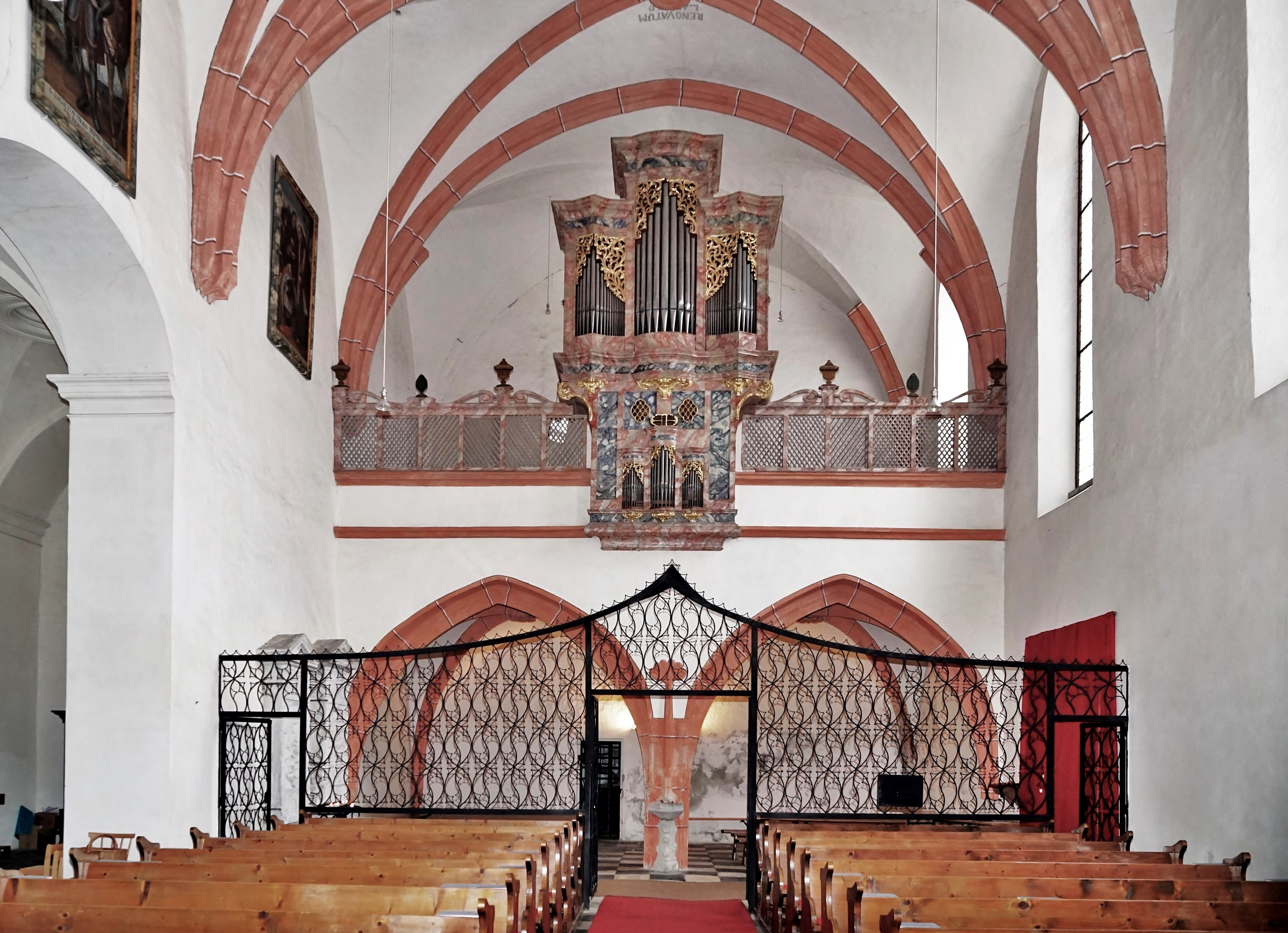 Klosterkirche Unsere Liebe Frau (St. Veit an der Glan), die Orgelempore